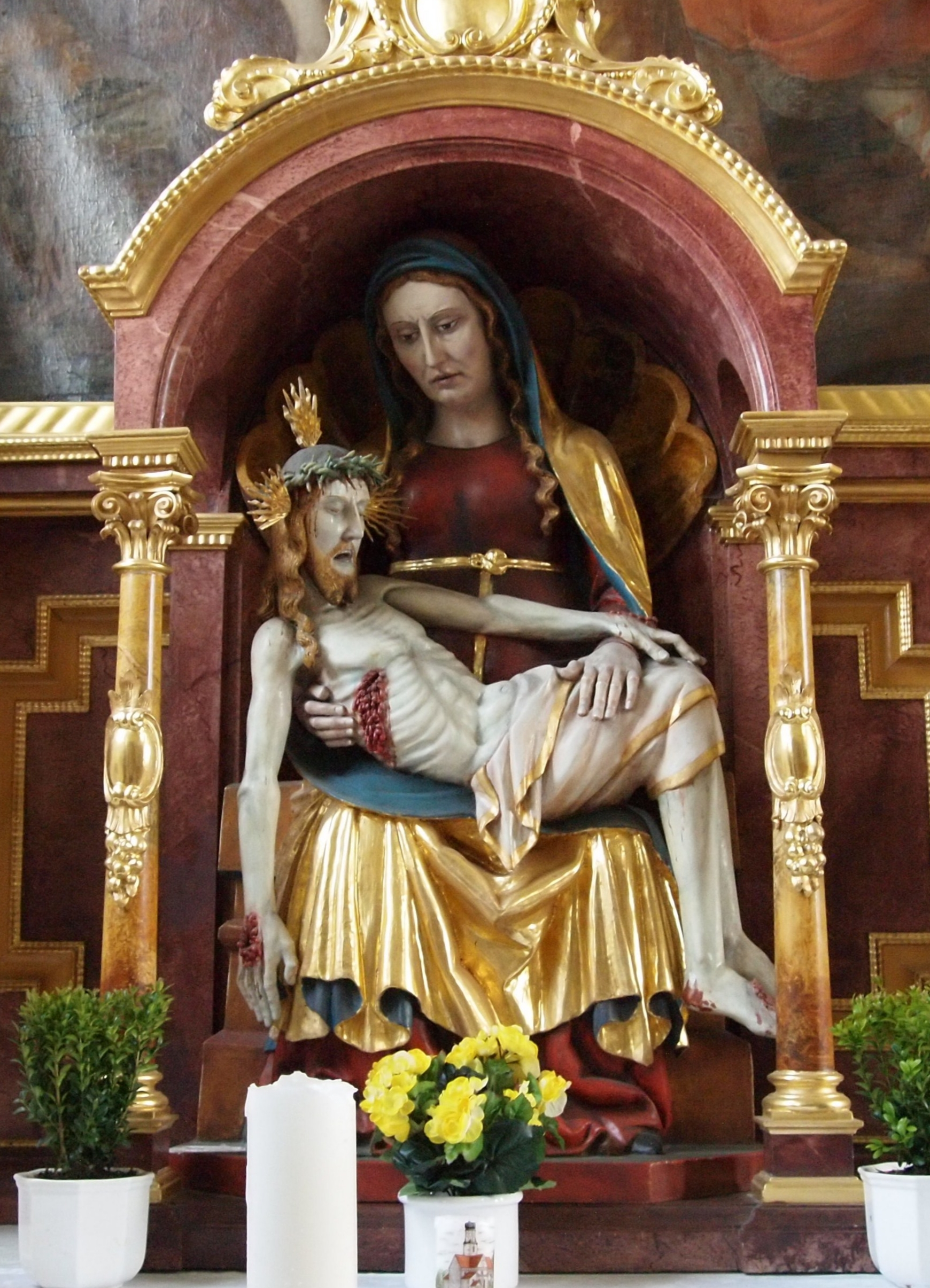 Hörmannshofen (Biessenhofen), Wallfahrtskirche St. Ottilia, hochgotische Pieta aus der Mitte des 14. Jahrhundert im linken Seitenaltar.